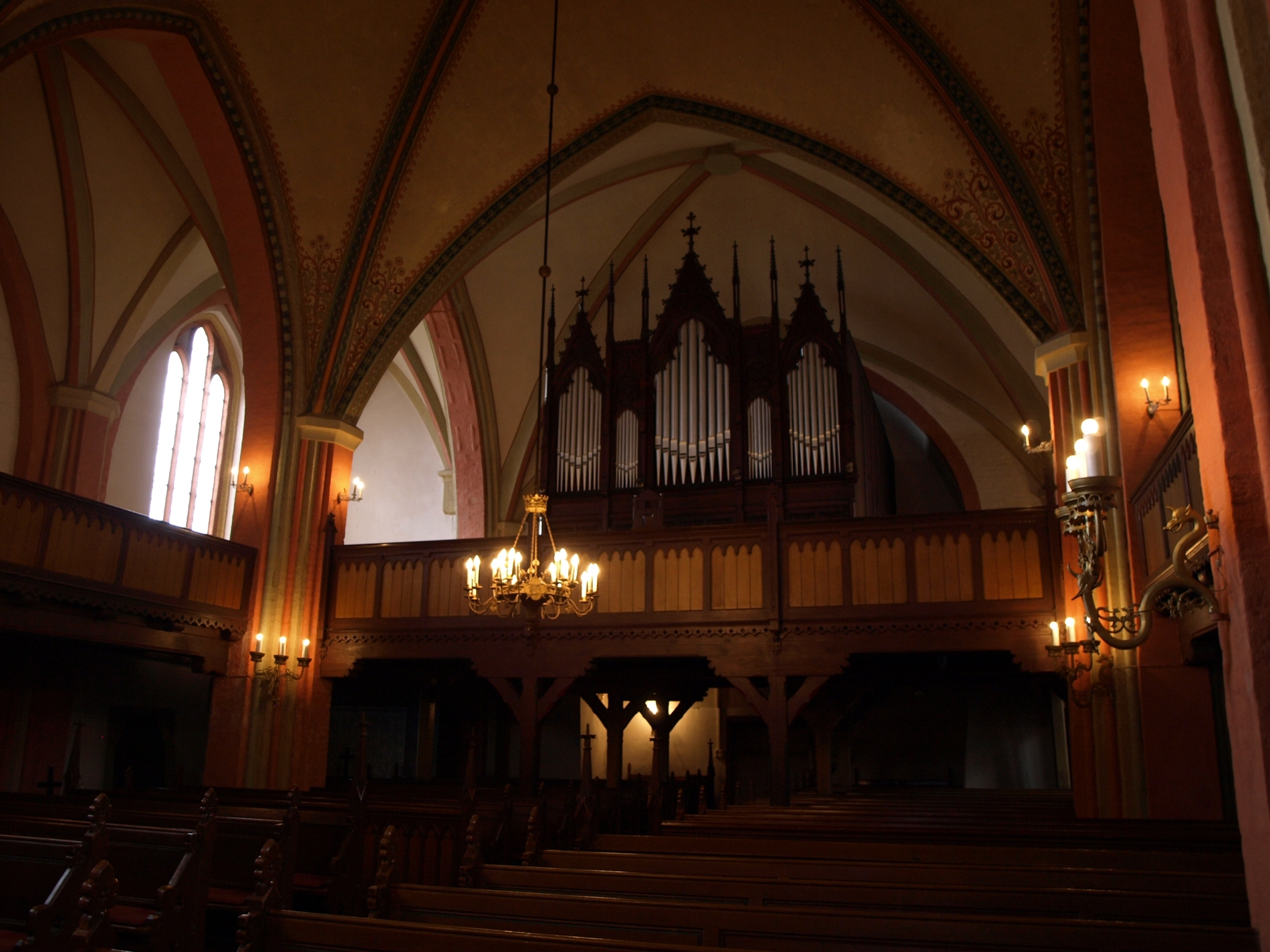 Friese III. Orgel, Marienkirche Boizenburg